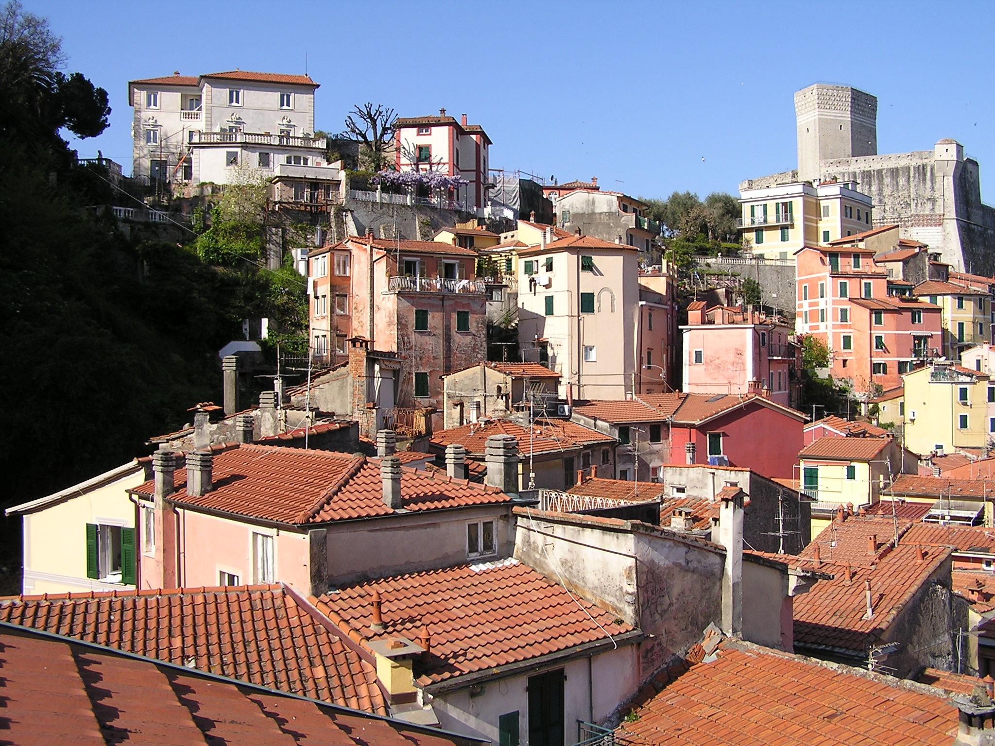 Lerici, panorama